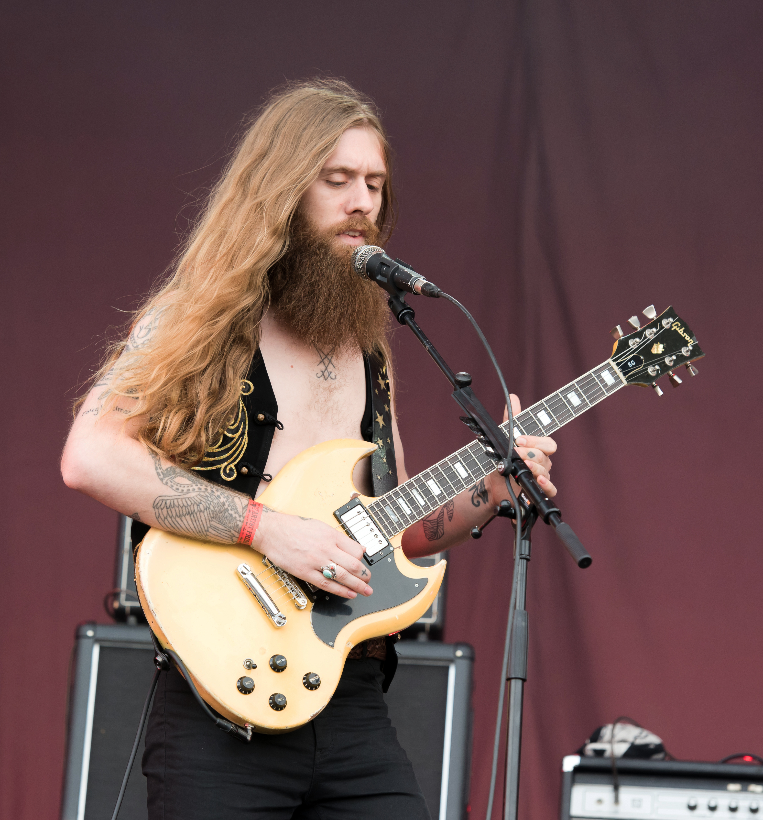 Kadavar beim Wacken Open Air 2017